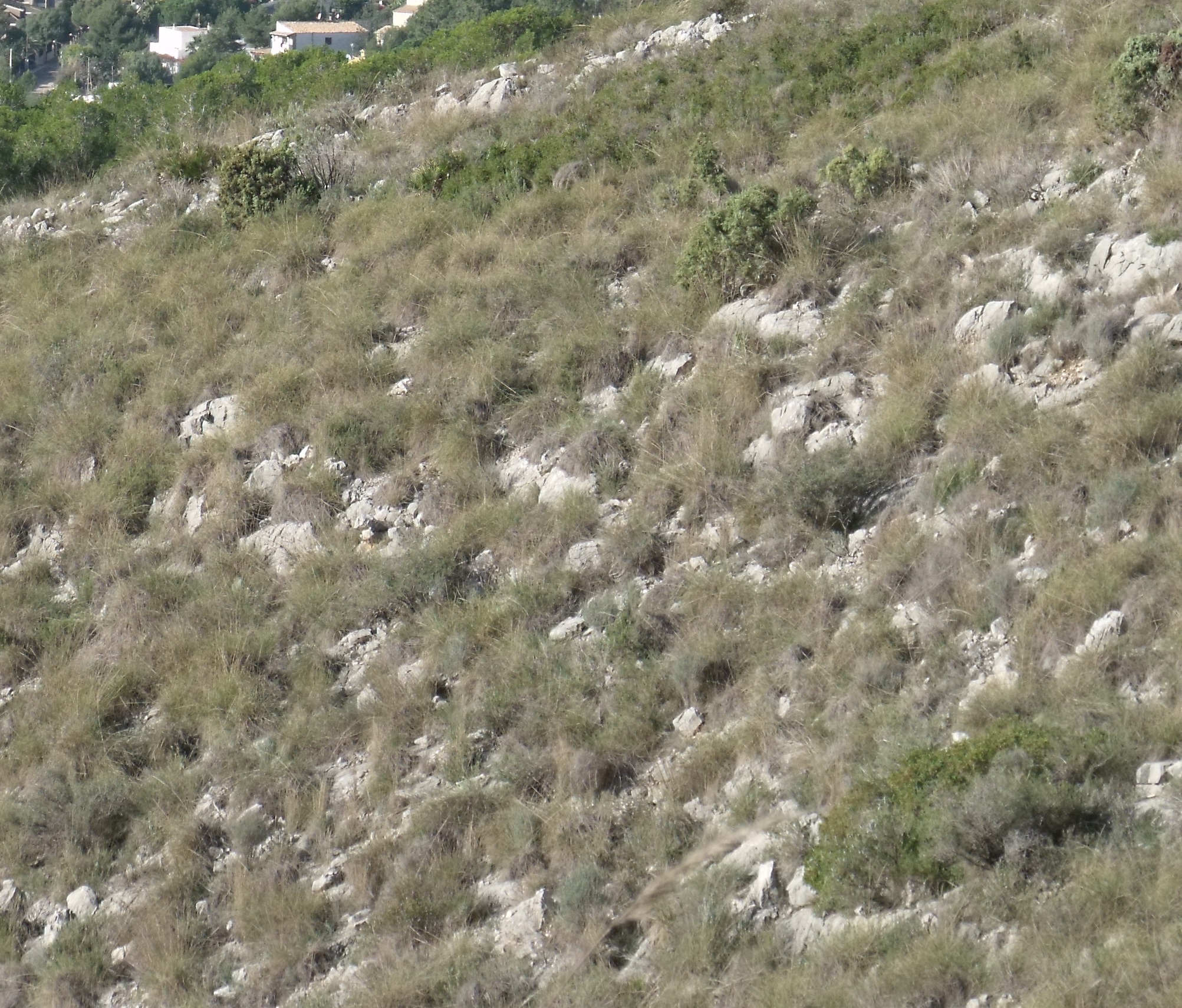 Piedra caliza y matorral en la Sierra Perenxiza.